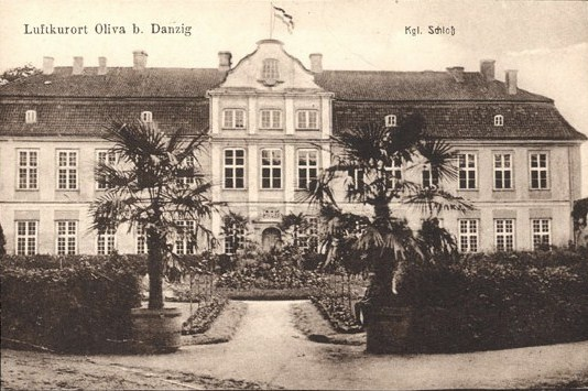 Pałac Opatów w Oliwie.